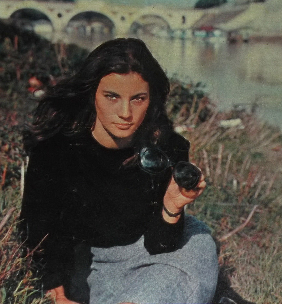 Italian actress Nicoletta Machiavelli